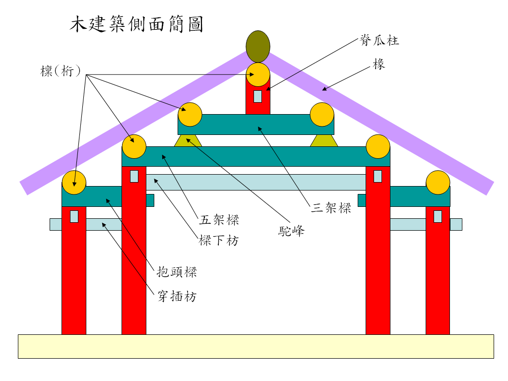 七檁大木作建築側面圖 (drawn by me)